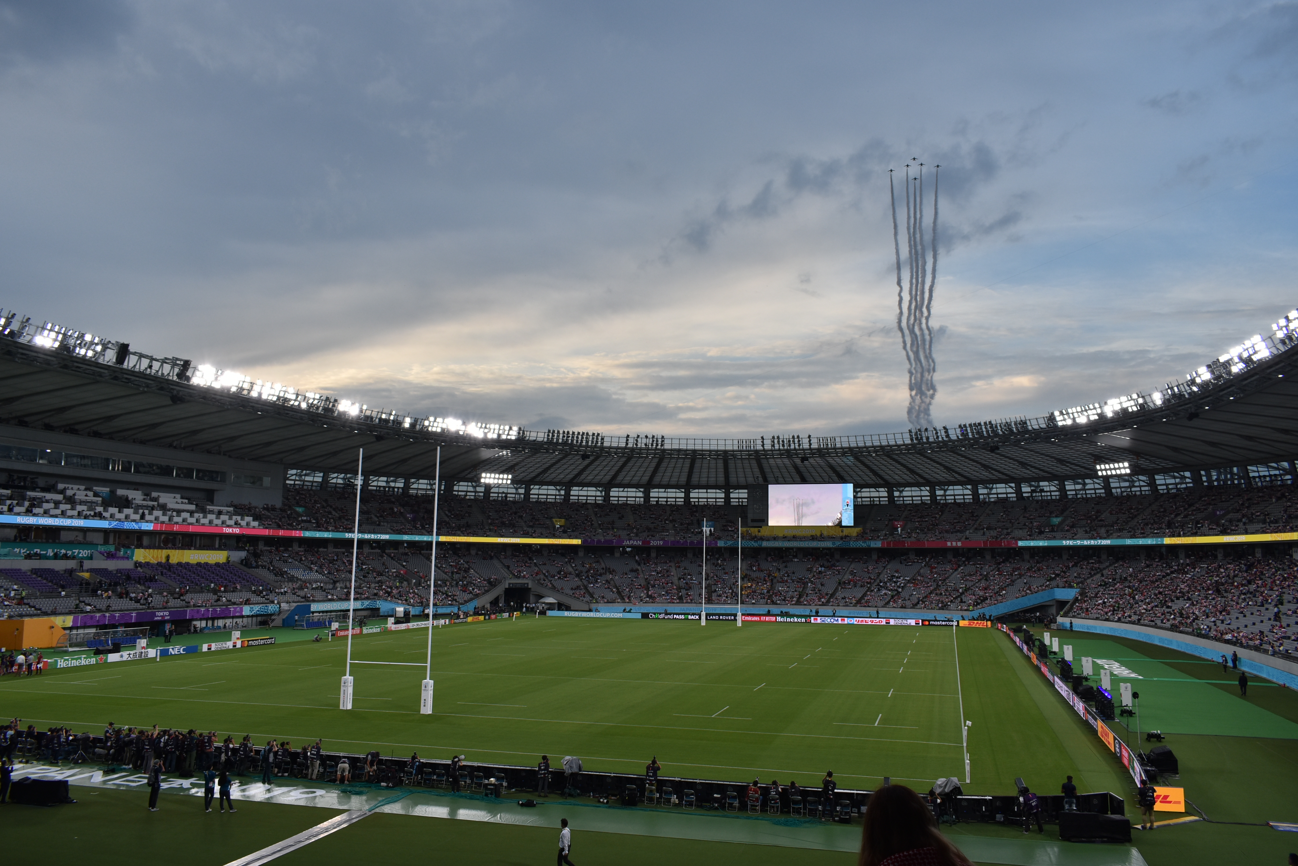 ラグビーワールドカップ